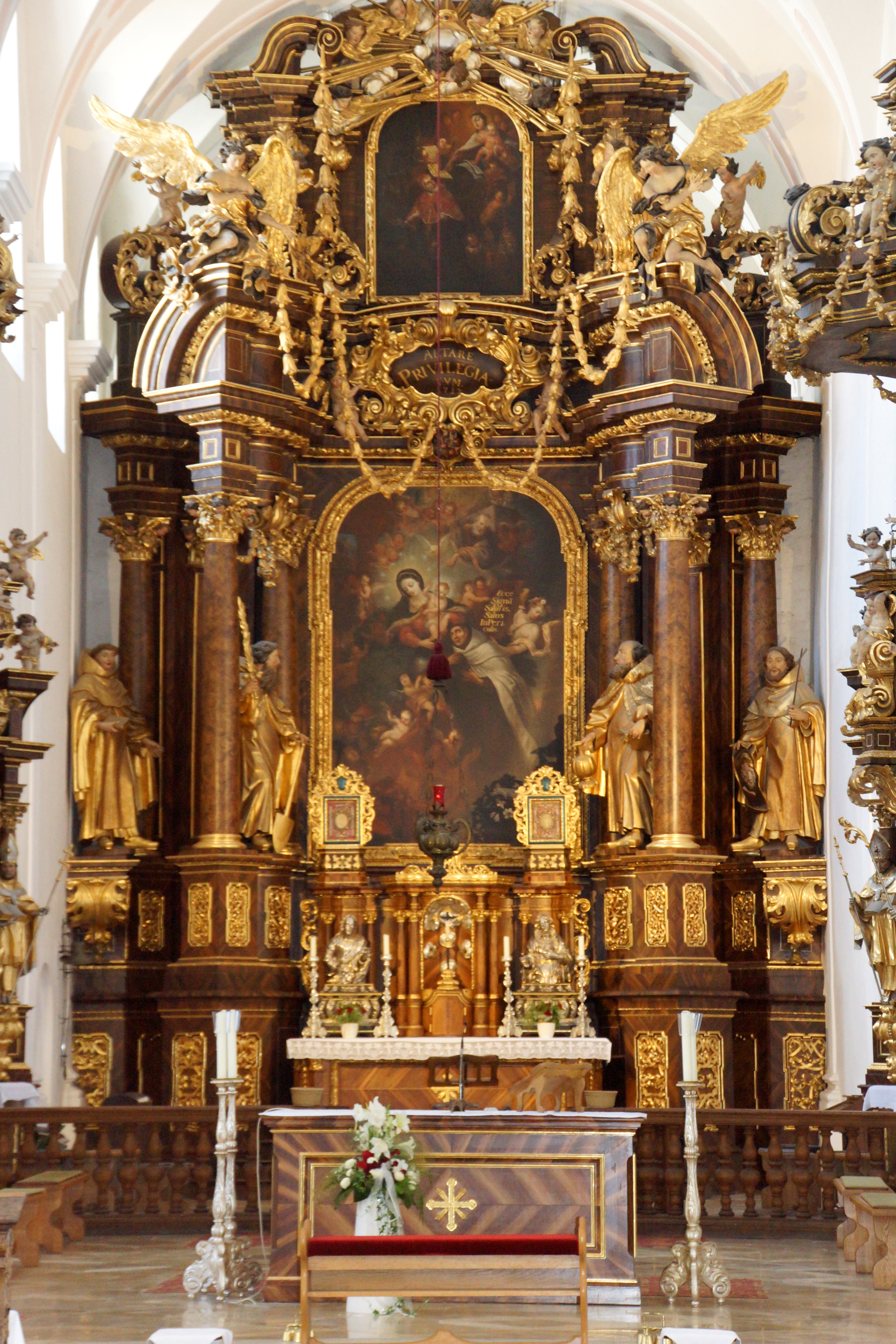 Die Klosterkirche des ehemaligen Karmelitenklosters in Abensberg